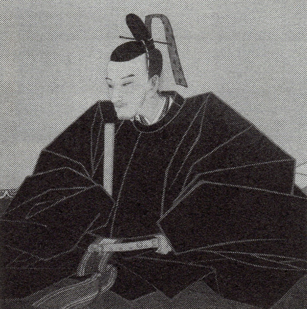 奥平昌暢の肖像(モノクロ)。